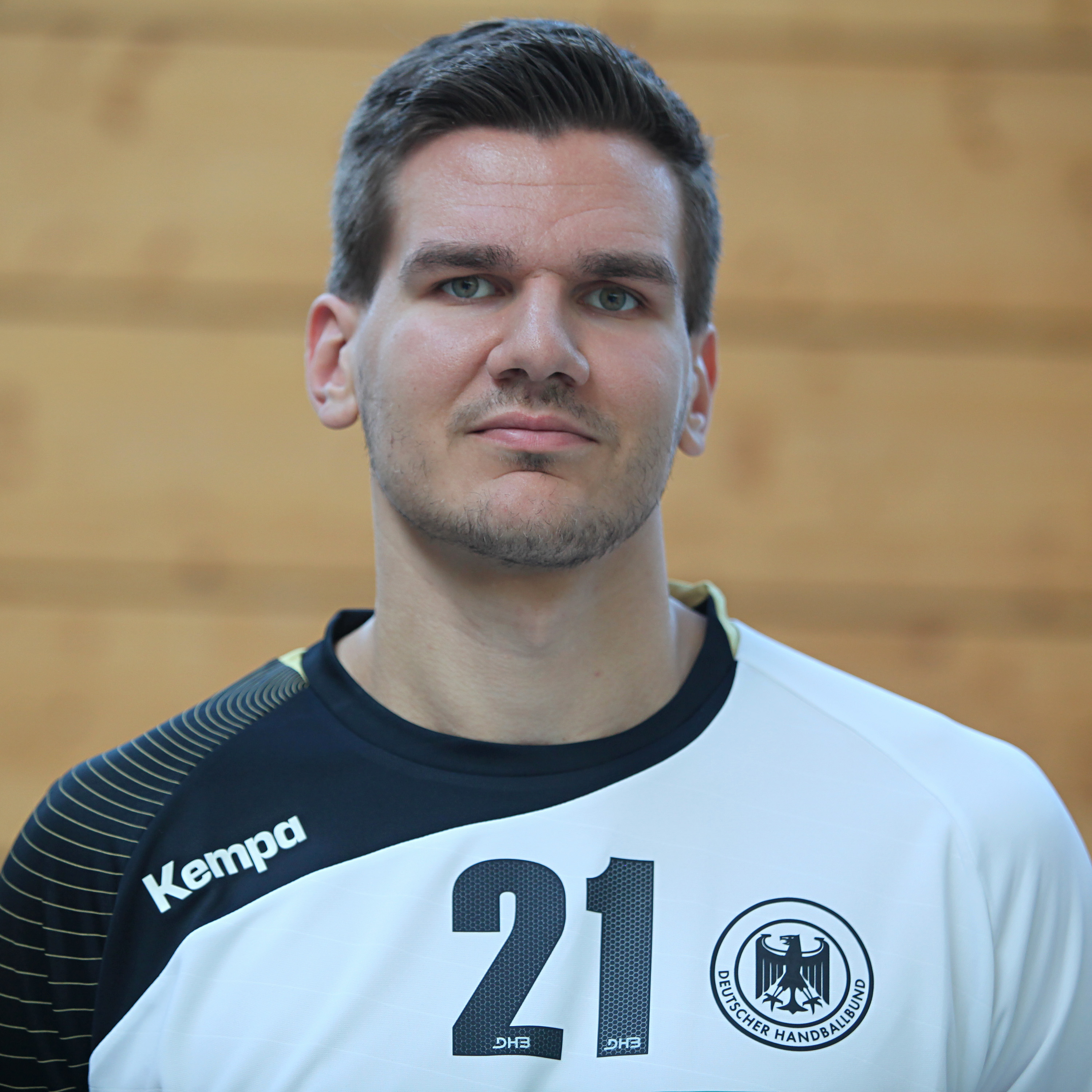 Erik Schmidt, im Trikot der Deutschen Handball-Nationalmannschaft am 16. September 2014, in Heilbronn.